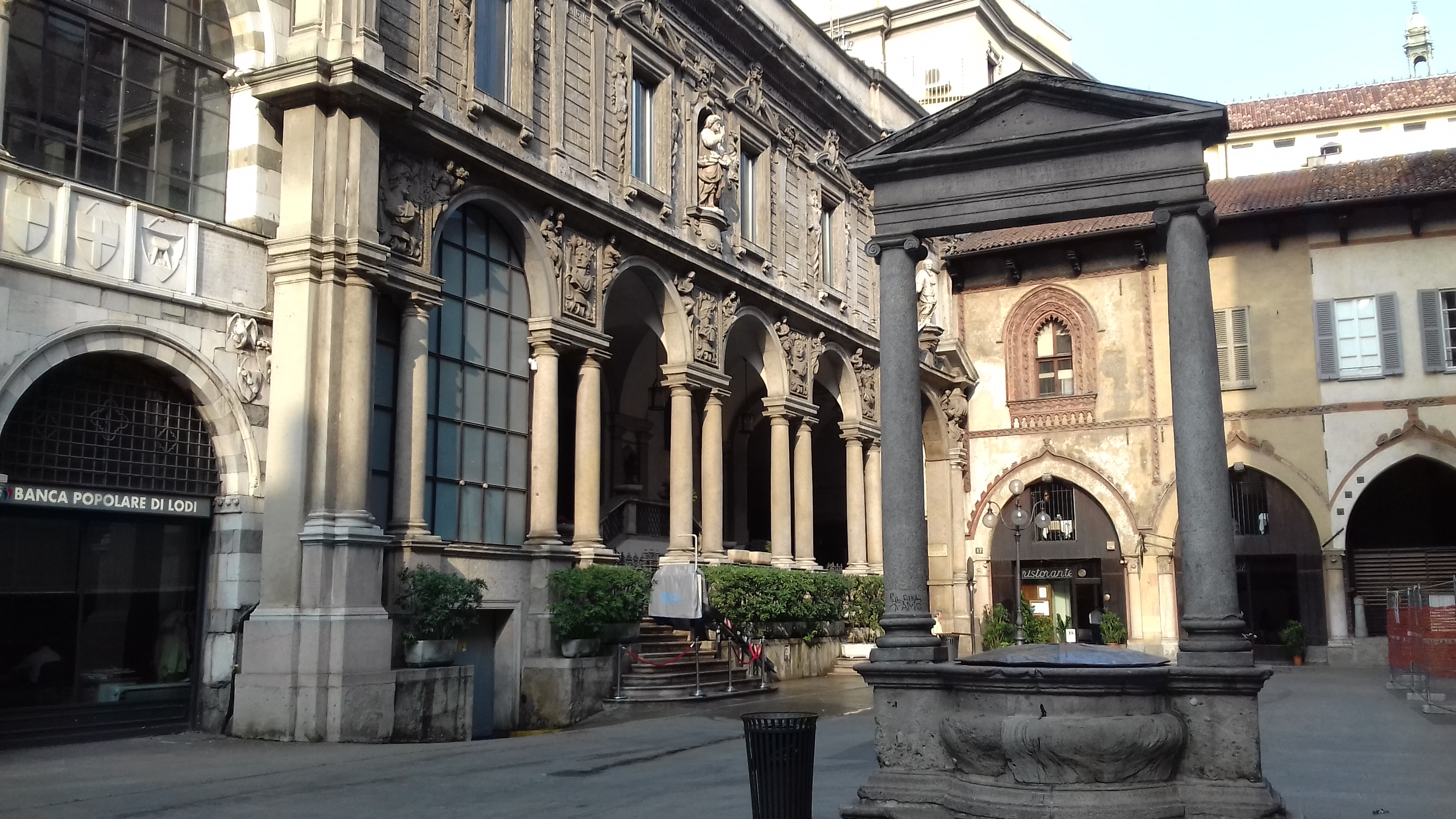 Milano, Piazza dei Mercanti